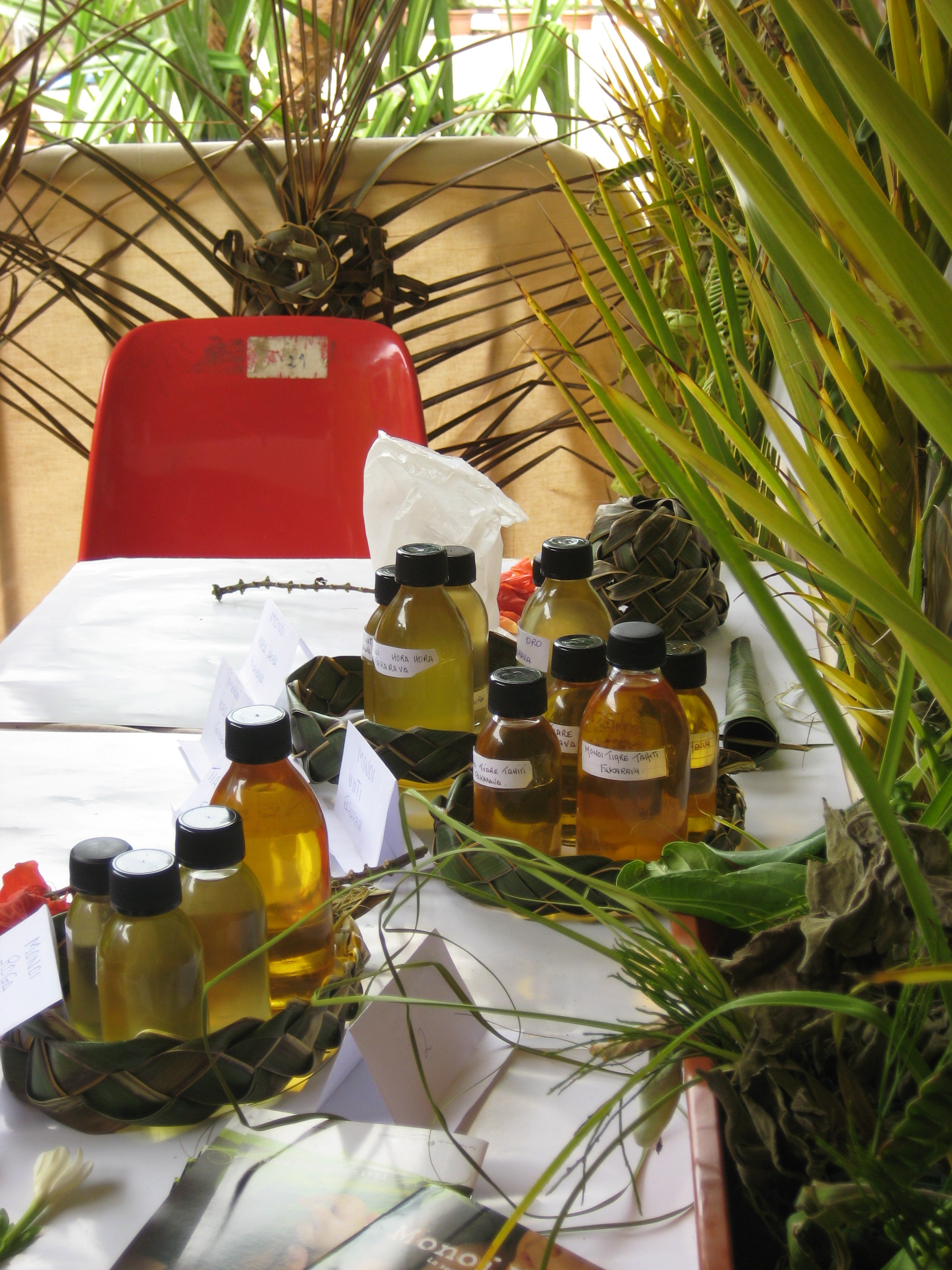 Monoï traditionnel de Fakarava